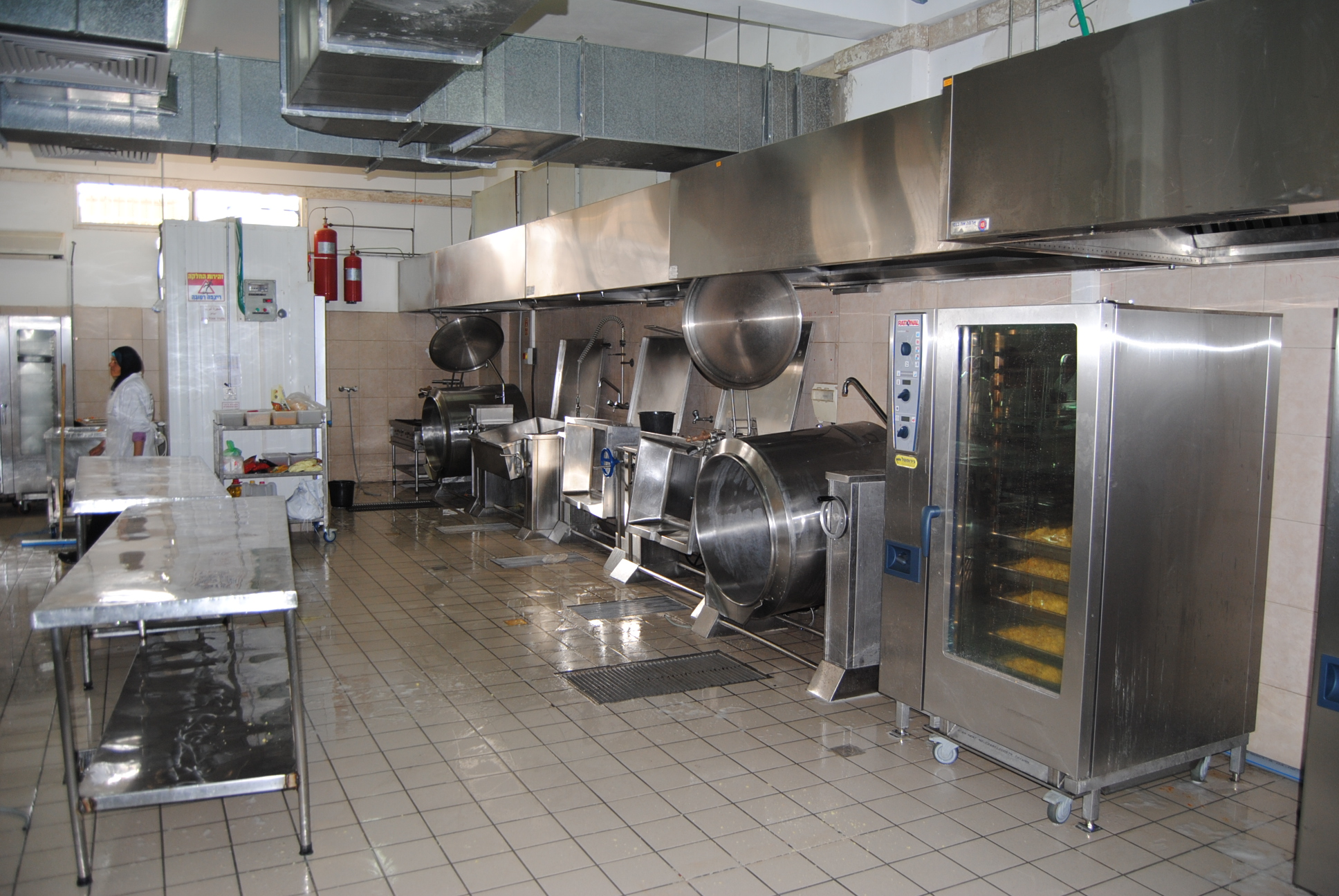 קייטרינג חורה הפועל כדי לספק הזנה לבתי הספר בחורה